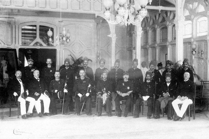 Repronegatief. Groepsfoto genomen in het gouvernementshuis te Kotaraja (Aceh) ter gelegenheid van de onderwerping van de sultan van Aceh en zijn zoon